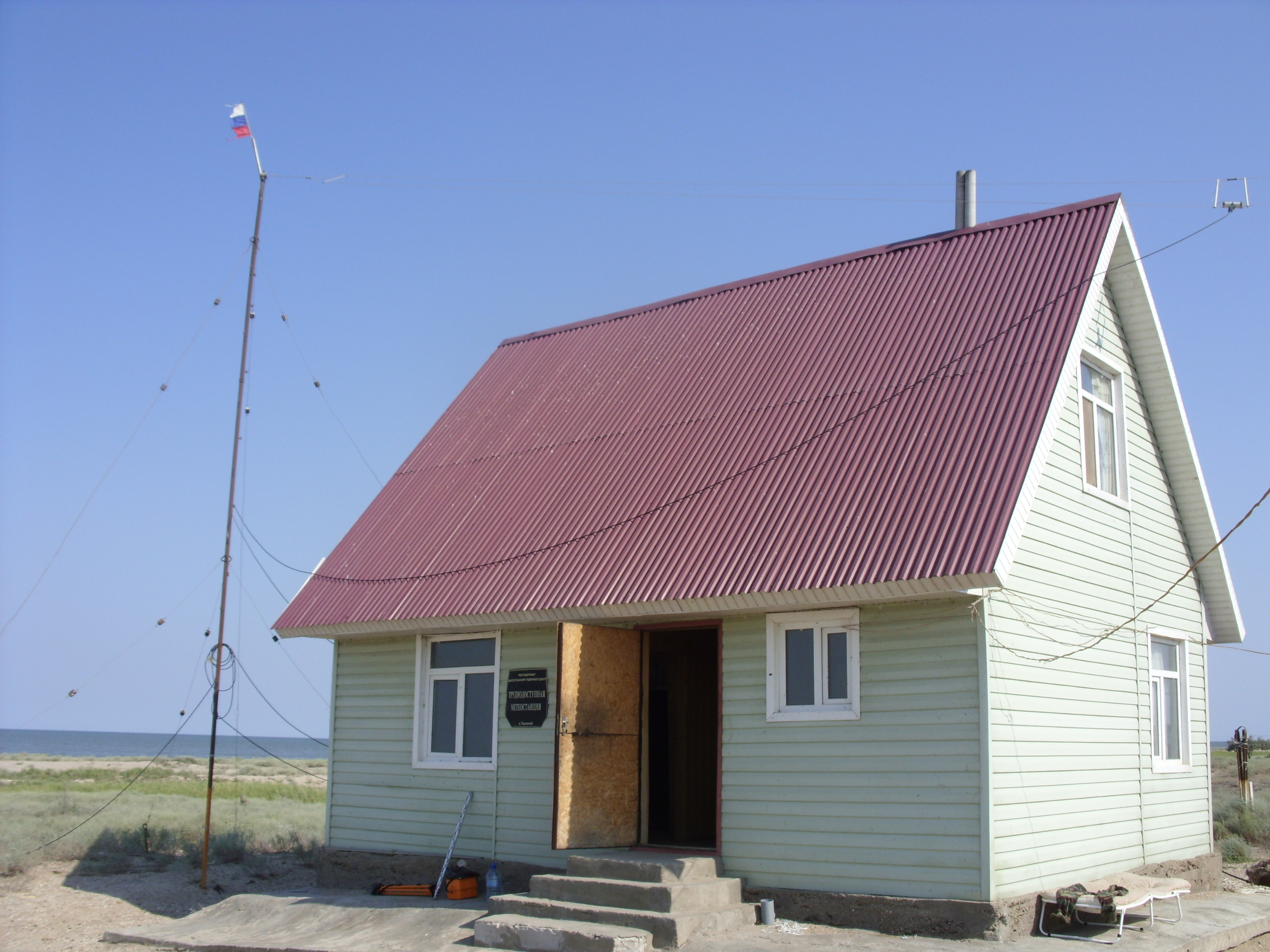 Здание метеостанции на острове Тюлений